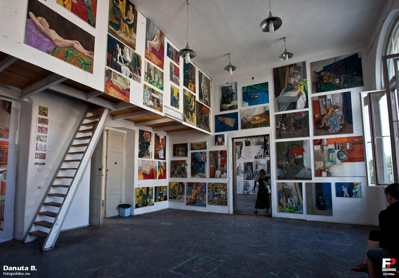 Sala na II piętrze. Okna otwarte na pl. Matejki.